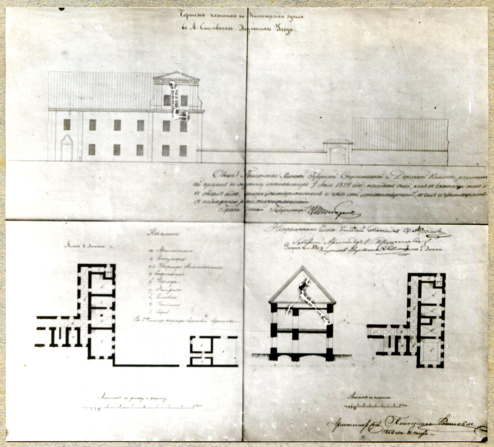 Беларуская (тарашкевіца): Сьмілавічы (Śmiłavičy). Касьцёл Сьвятога Вінцэнта і кляштар місіянэраў, абмеры